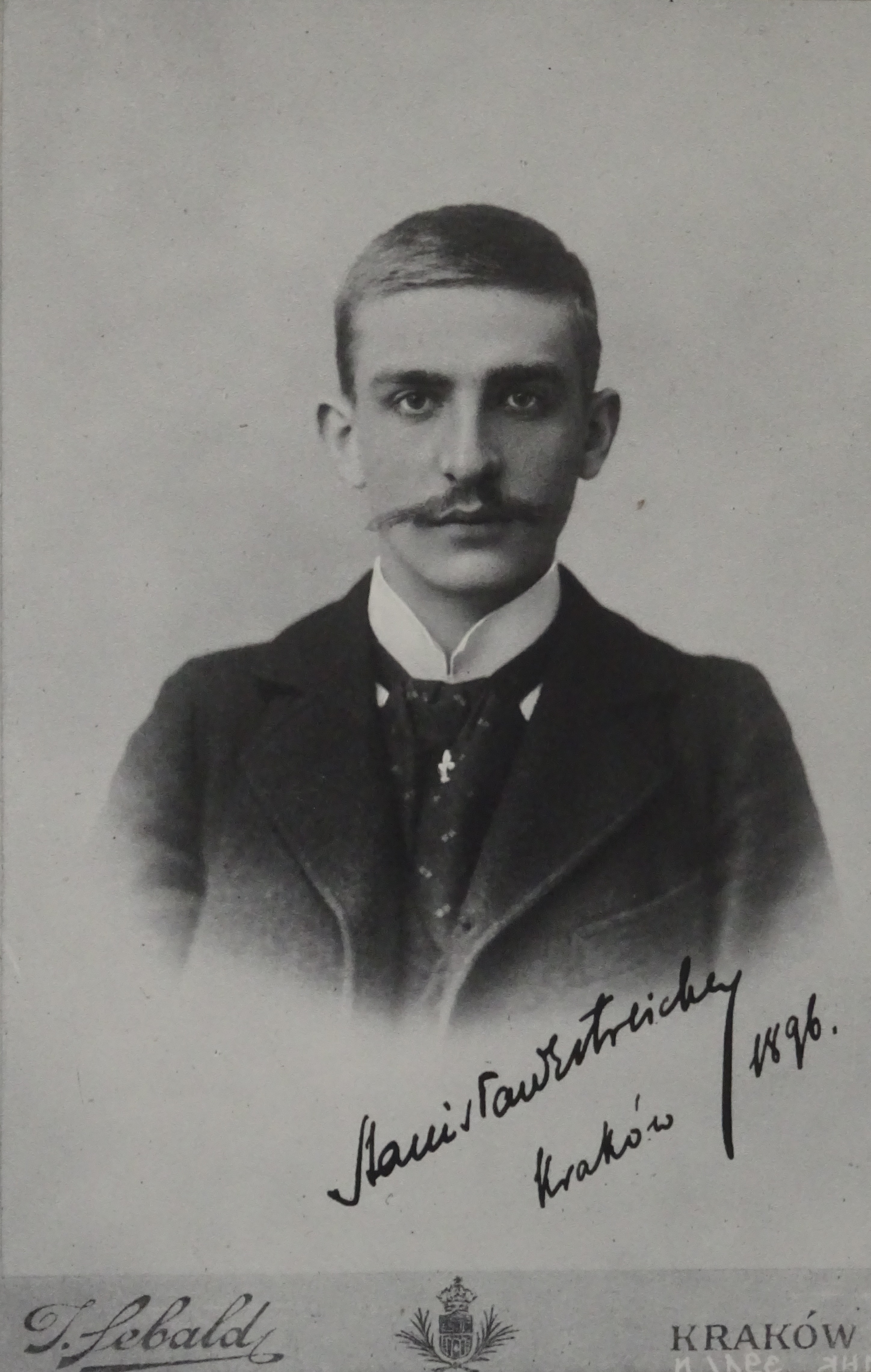 Stanisław Estreicher - historyk prawa, bibliograf, profesor i rektor Uniwersytetu Jagiellońskiego.